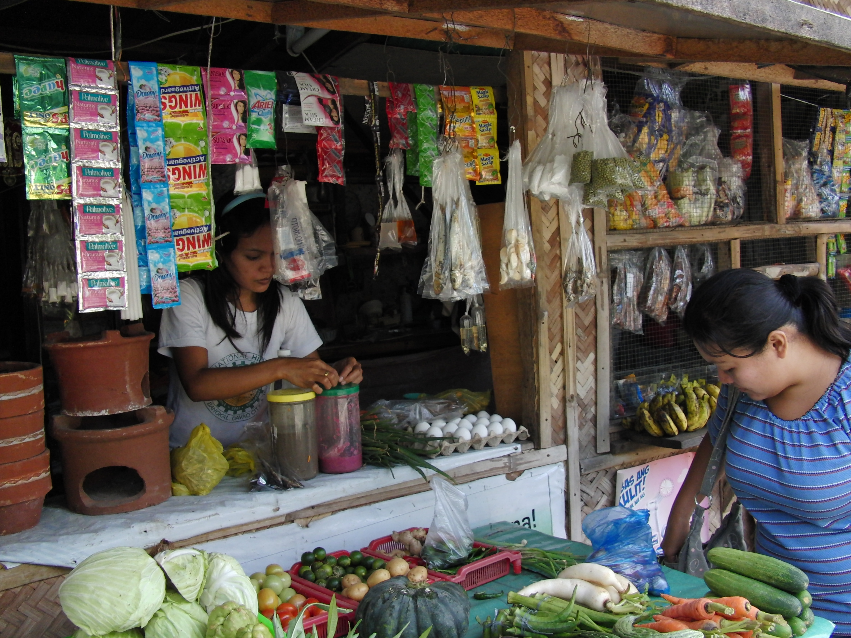 bangkal davao people sari sari store